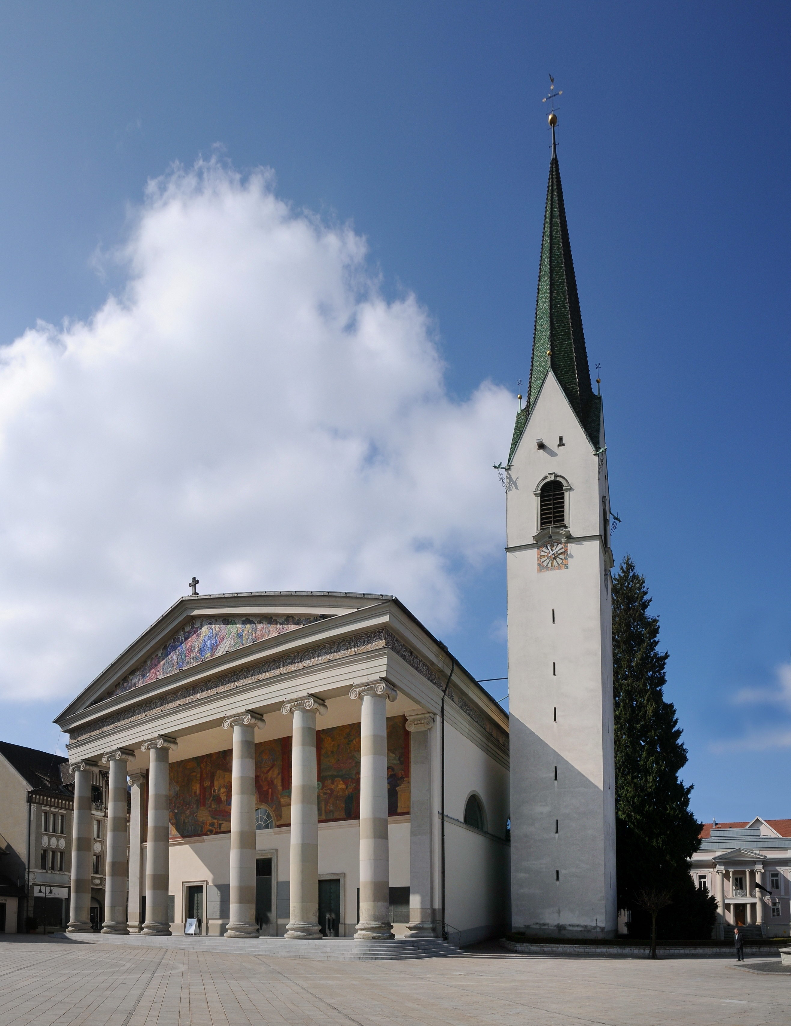 Stadpfarrkirche St.Martin in Dornbirn. *** Veröffentlicht: Alois Niederstätter in "Geschichte Vorarlbergs Band 2 Vorarlberg 1523 bis 1861 Auf dem Weg zum Land ISBN 978-3-7030-0864-1 2015 ohne Lizenzangabe